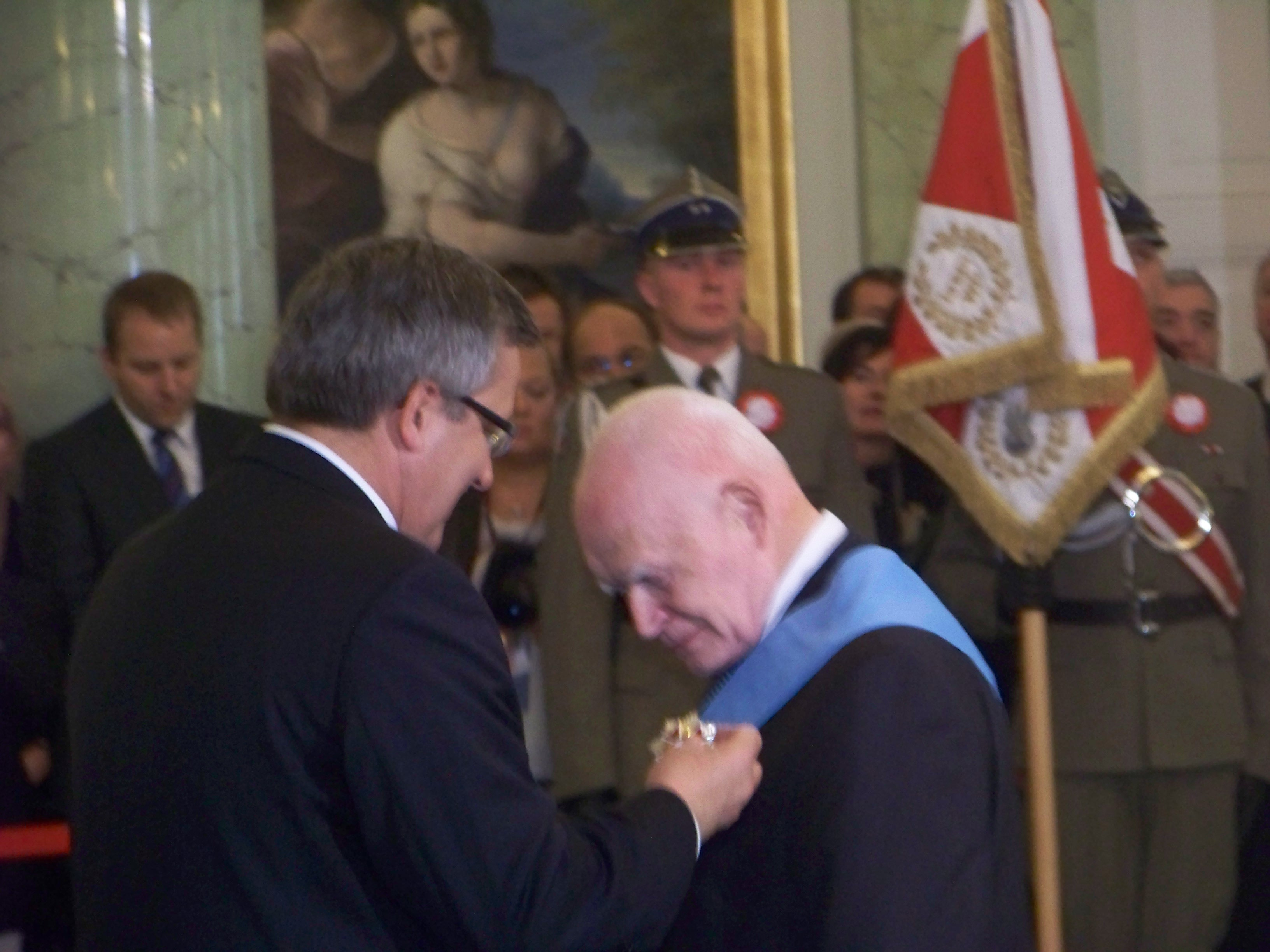 Obchody Święta Niepodległości 2012 w Warszawie.